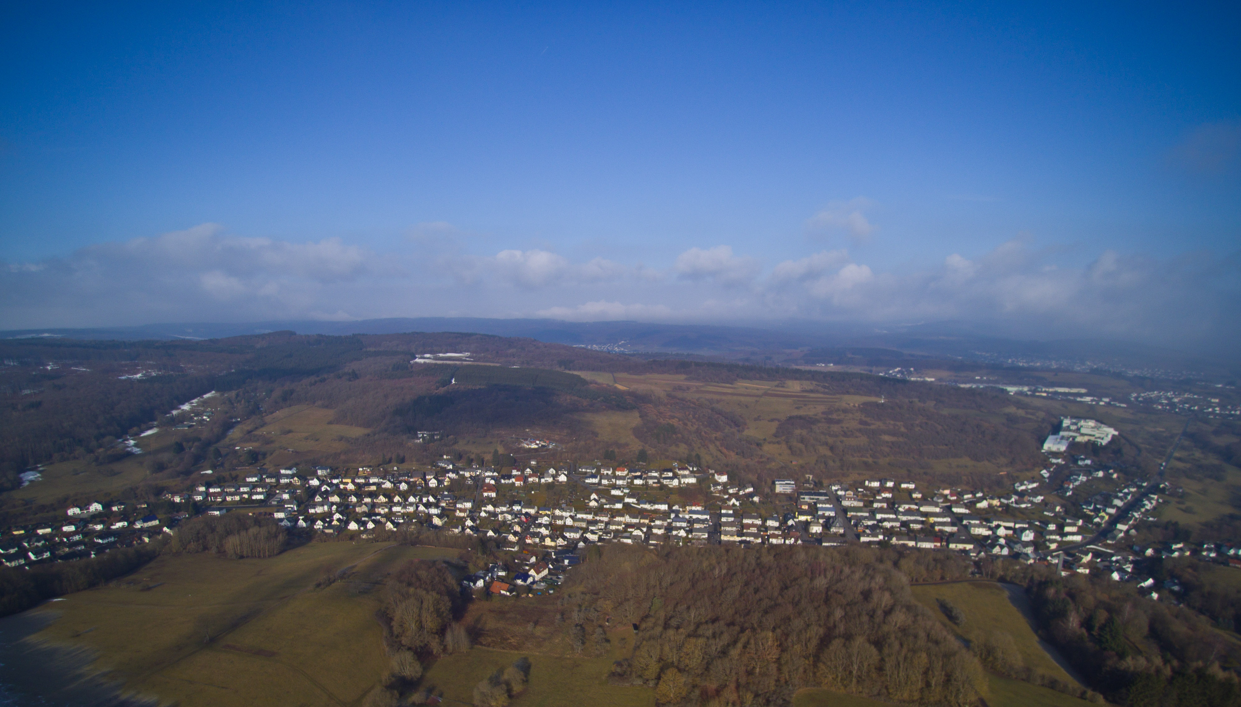 Langenaubach aus 100m höhe.